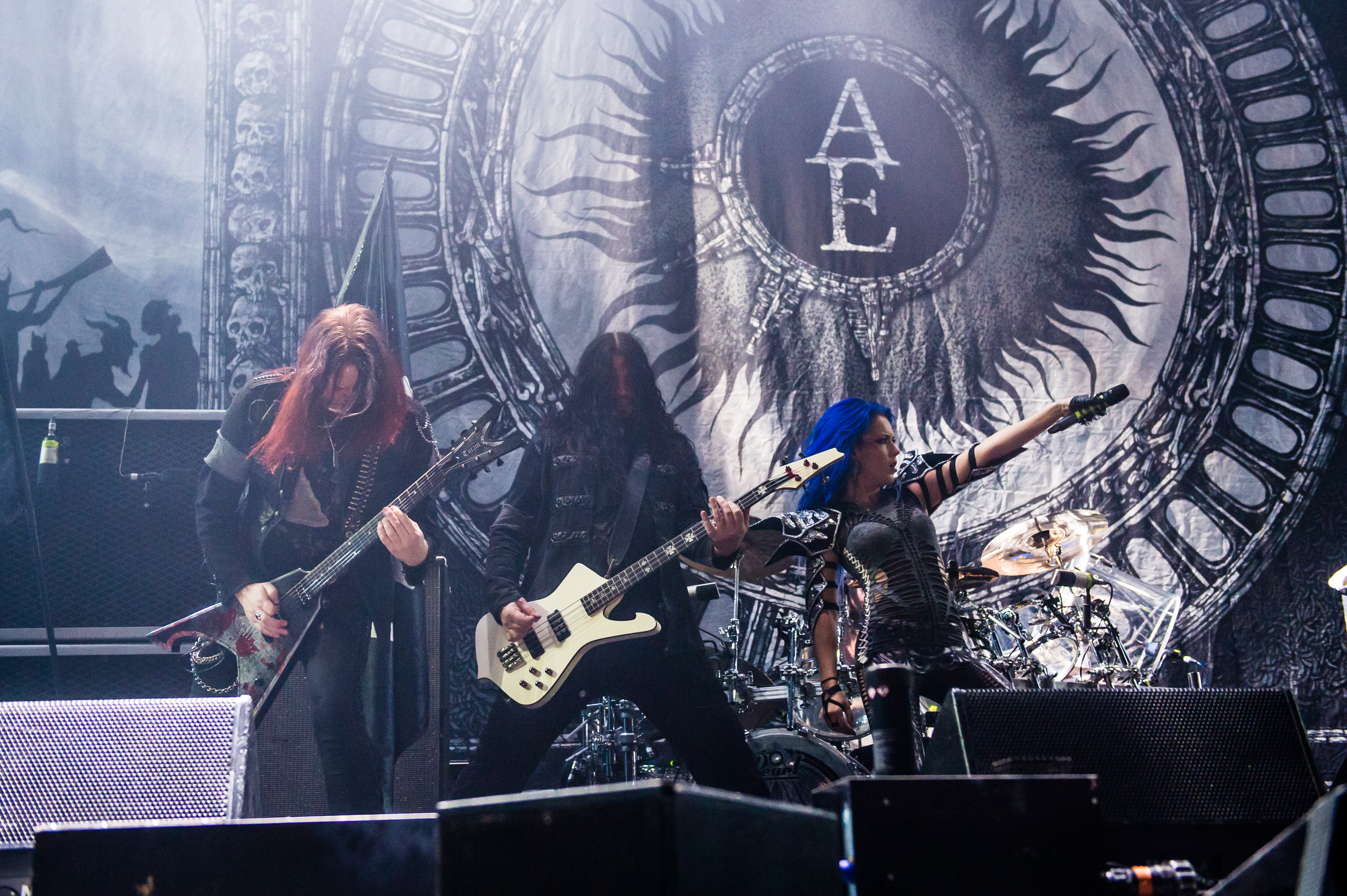 'Arch Enemy - Support für Nightwish Endless forms most beautiful Tour 2015 Oberhausen'